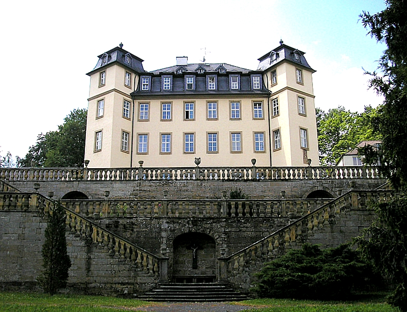 Schloss Untermerzbach bei Ebern (Landkreis Haßberge, Unterfranken). Ansicht aus dem Schlosspark. Eigene Aufnahme, Juni 2006 / Untermerzbach castle near Ebern (Lower Franconia, Germany). View from the park. Own photo, June 2006